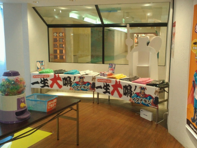 泉佐野市イメージキャラクターのアンテナショップ